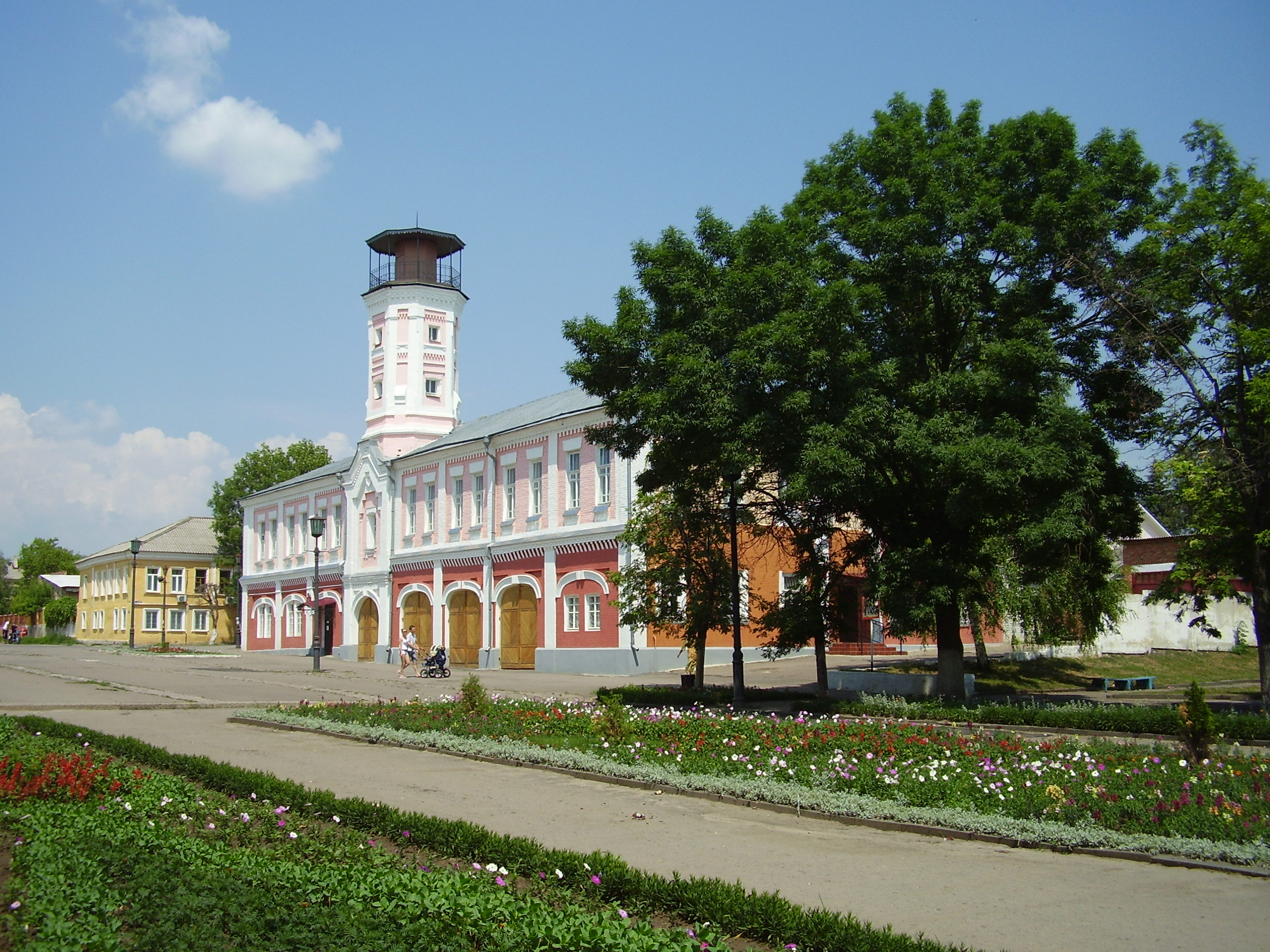 Острогожск. Историко-художественный музей